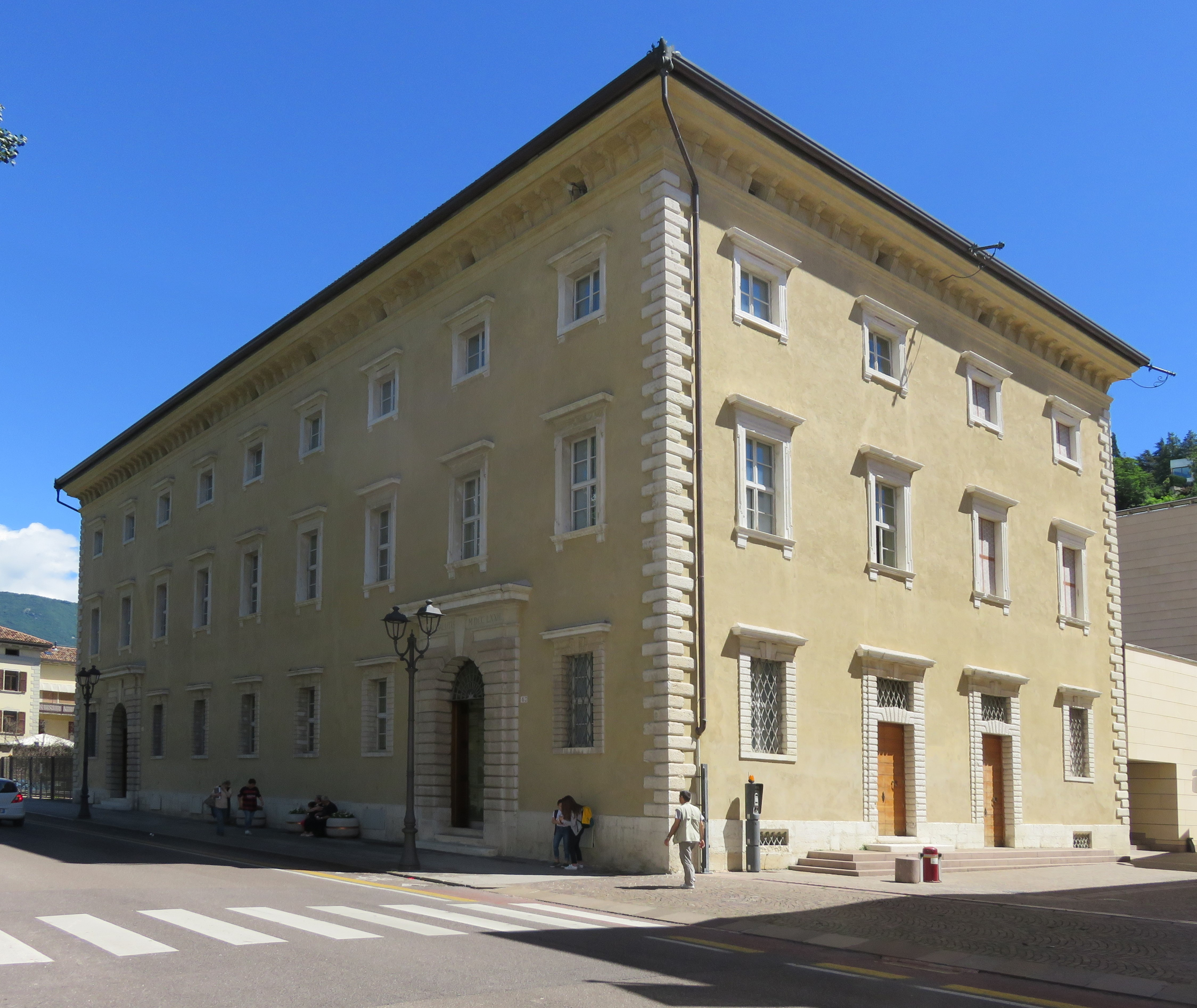 Palazzo ex Annona corso Bettini, ora ospita la biblioteca comunale e si trova sul percorso di accesso al MART